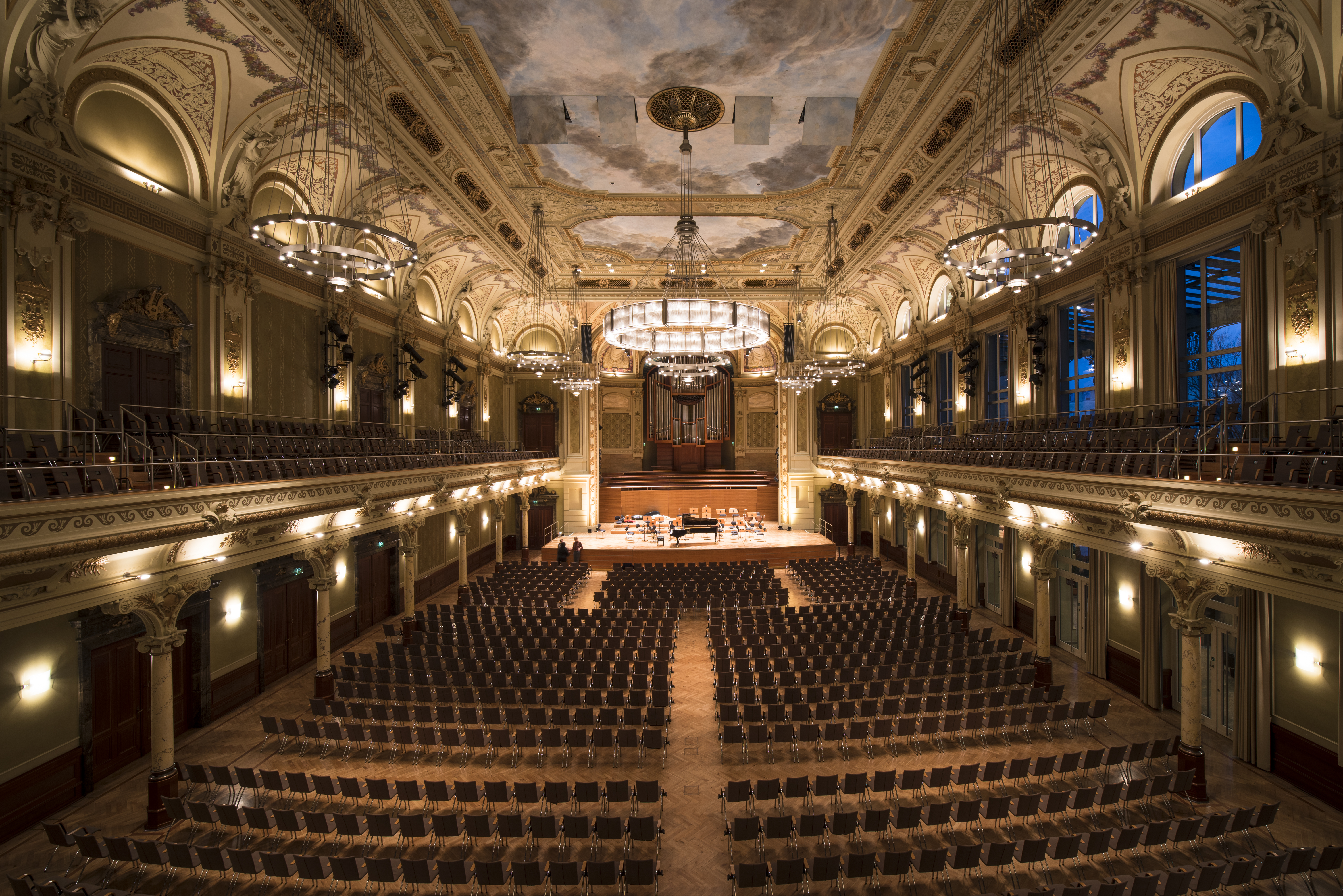 Die Historische Stadthalle Wuppertal, das Stammhaus des Sinfonieorchester Wuppertal